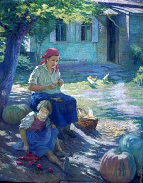 Récolte, tableau de Iakov Mintchekov 1898 Musée de Kamensk 1898